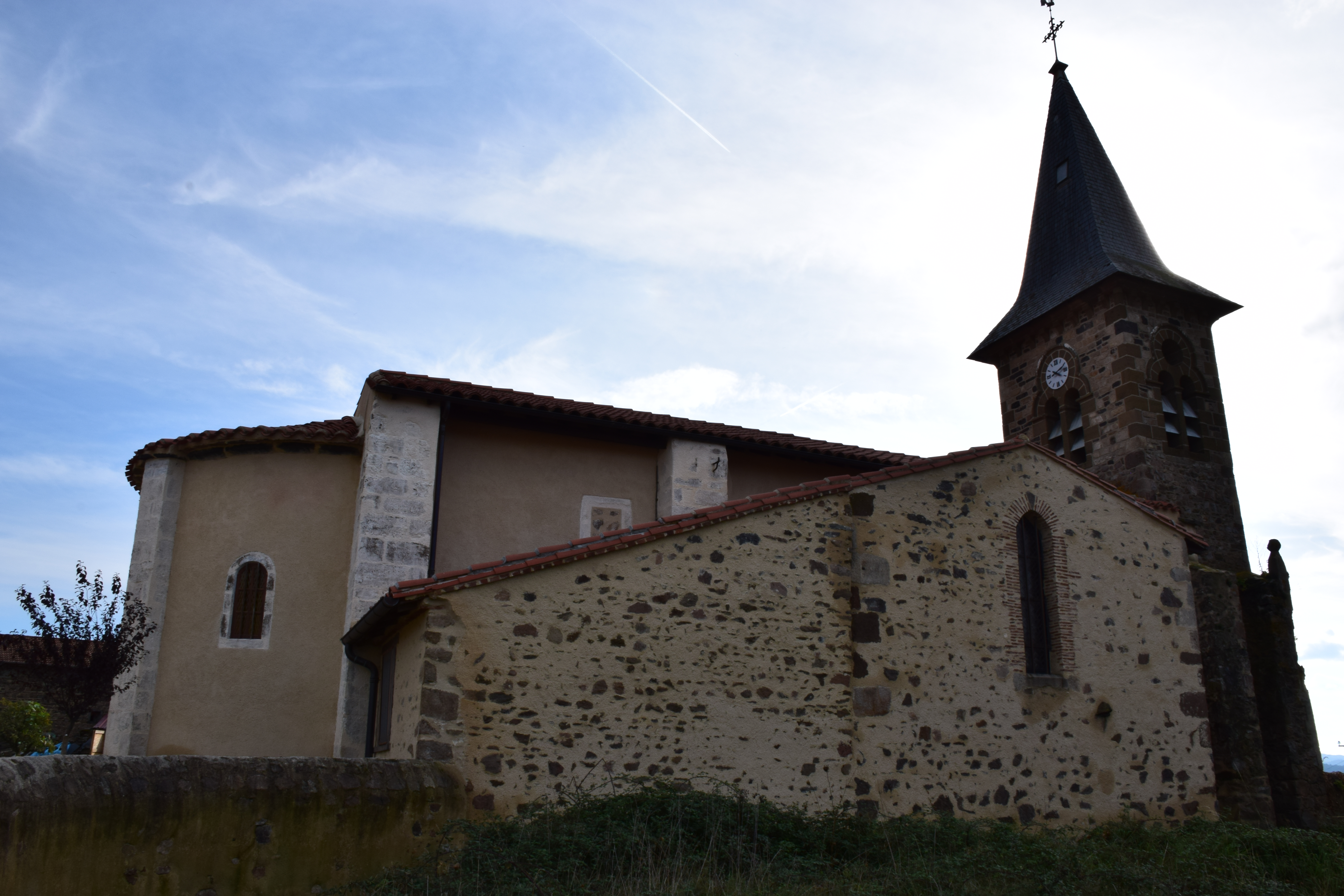 L'église de Javaugues.